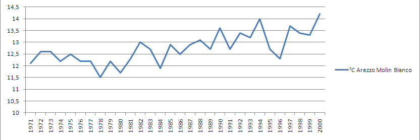 Stazione meteorologica di Arezzo Molin Bianco: andamento della temperatura media annua dal 1971 al 2000